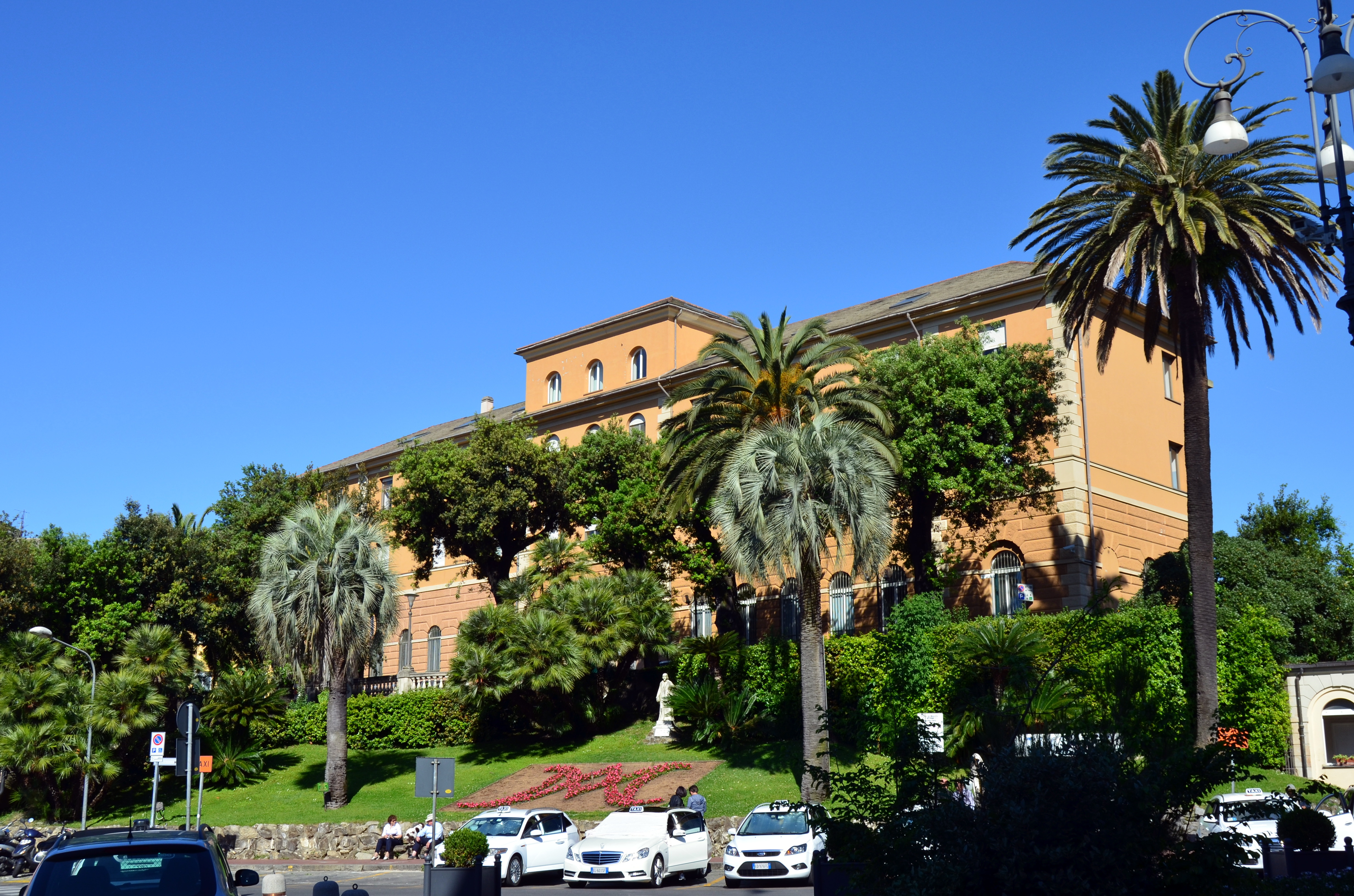 Ex ospedale civile di Rapallo, Liguria, Italia